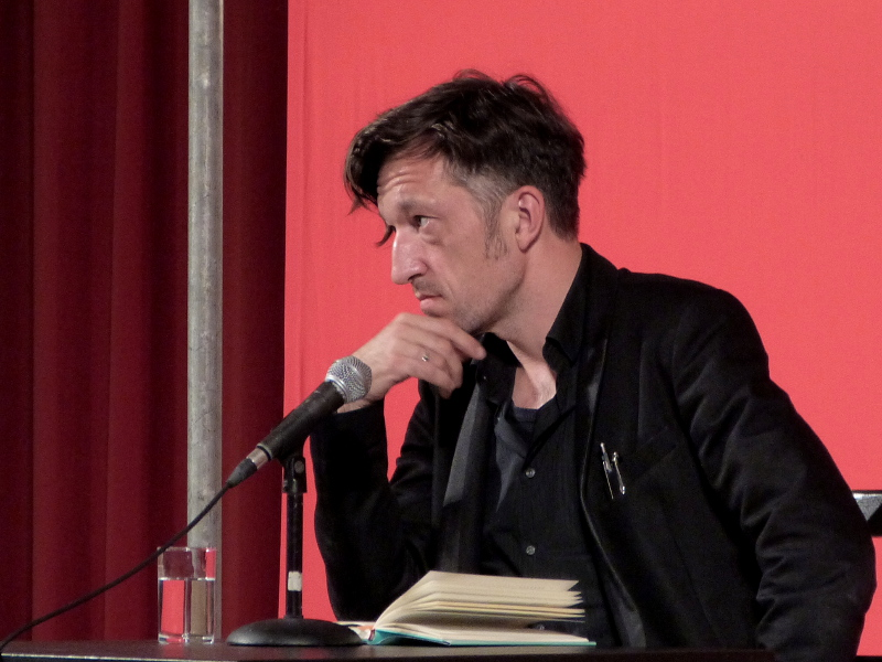 Swiss author Lukas Bärfuss, at the Erlanger Poetenfest 2014.